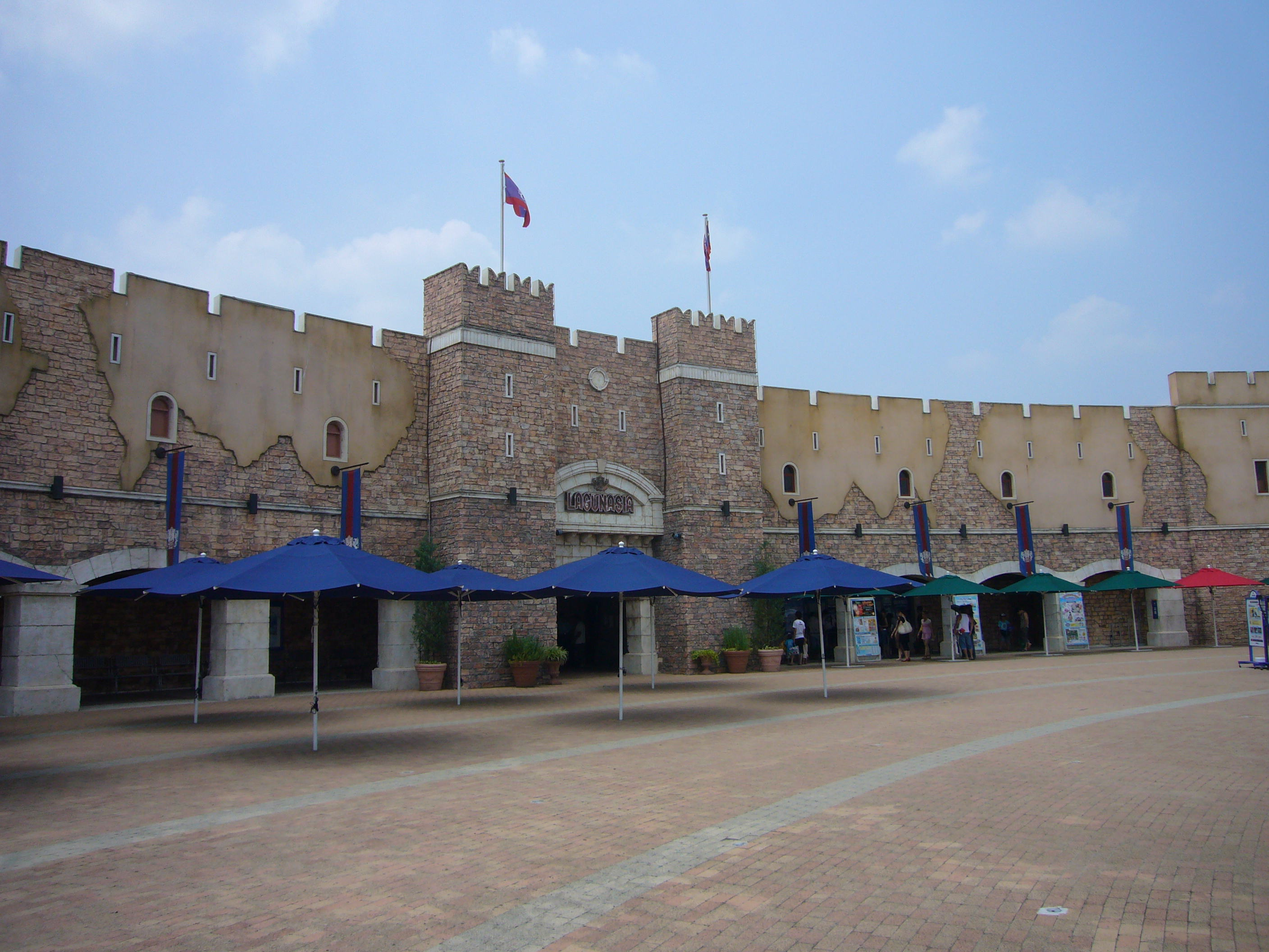 ラグナシア